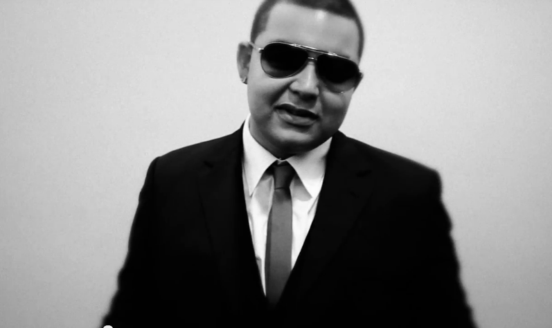 Brownie Dutch